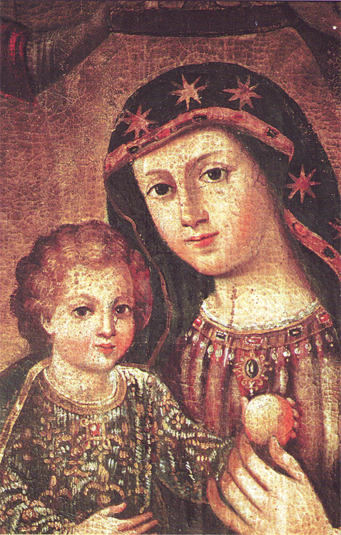 San Giovanni in Fiore - Chiesa di Santa Maria della Sanità, tela della "Madonna della Sanità"